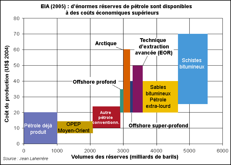 Reserves pétrole disponibles en fonction du cout économique selon EIA (2005) Source : Jean Laherrère